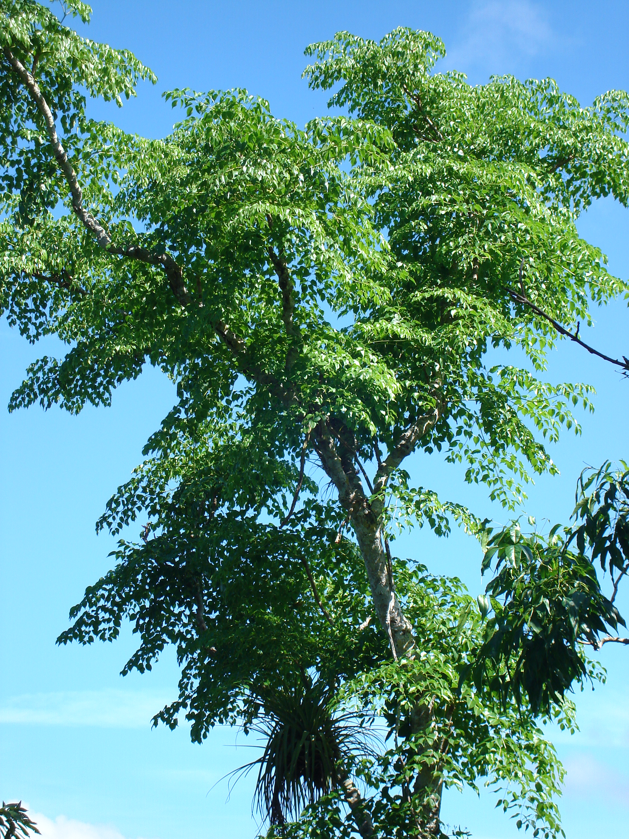 Aralia rex en Sierra de La Caoba, Parque Nacional Viñales, Pinar del Río, Cuba